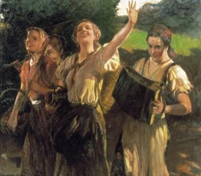 detail